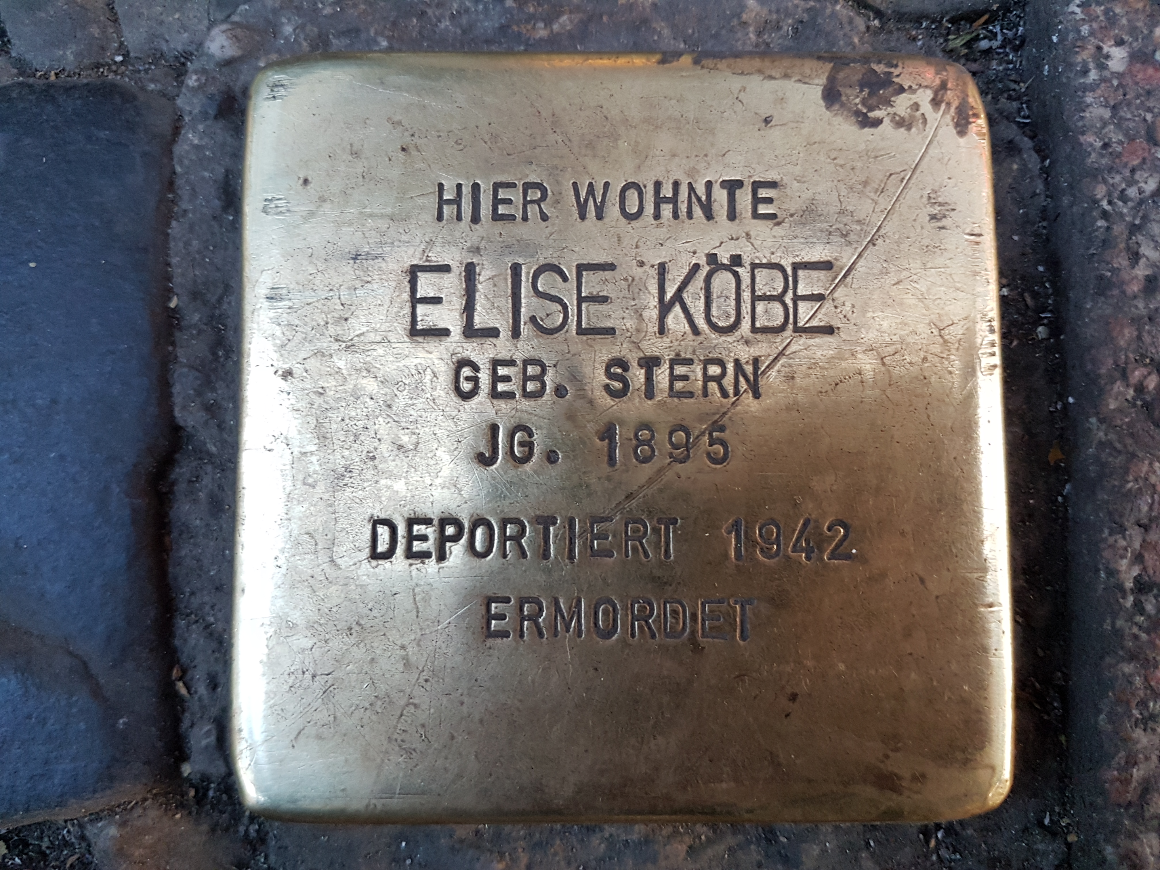 Elise Köbe Stolperstein Duisburg